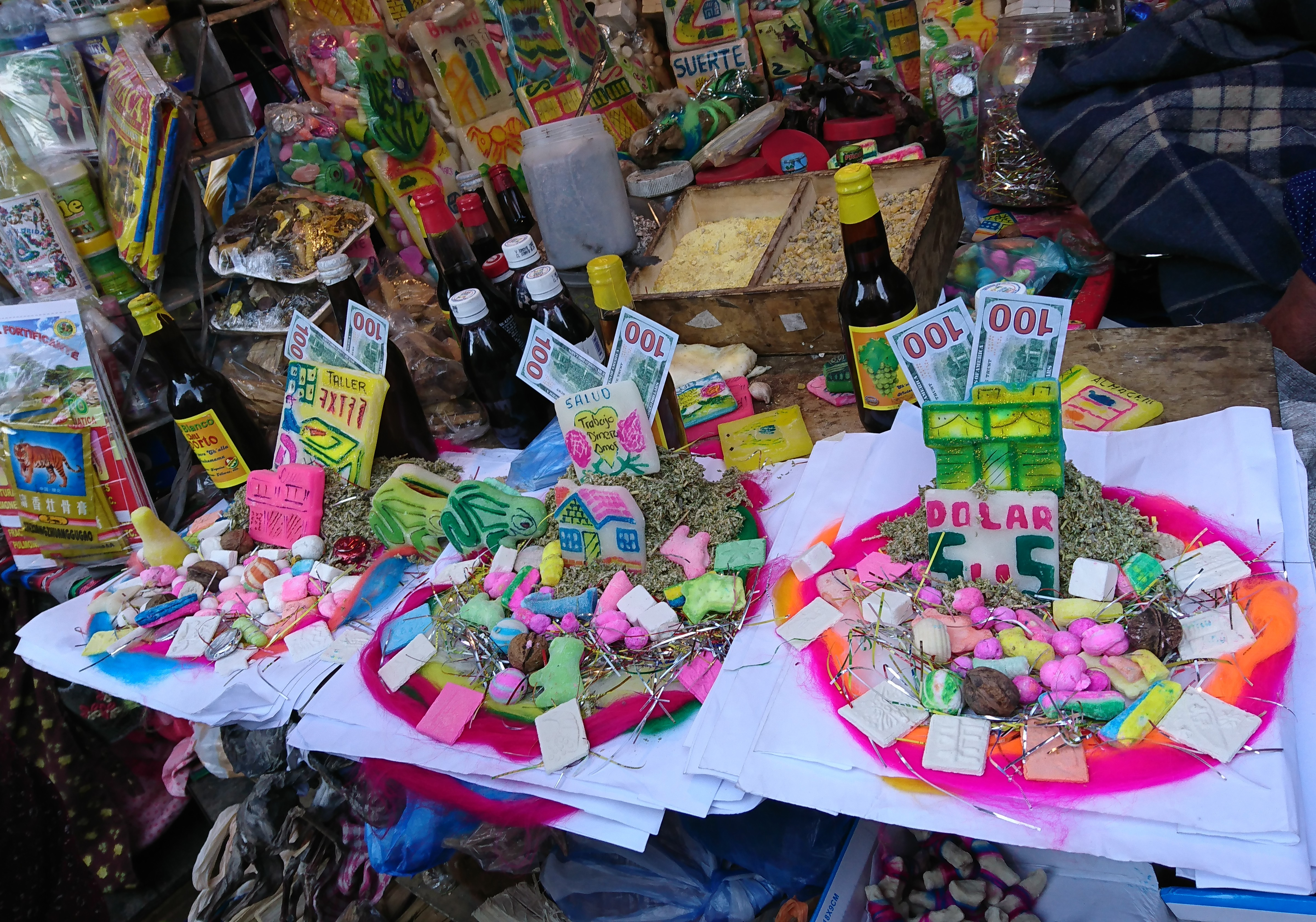 conjunto de elementos ceremoniales para ofrenda a la Pachamama